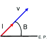 Diagrama fasorial de una resistencia en CA (resistor's diagram in AC)